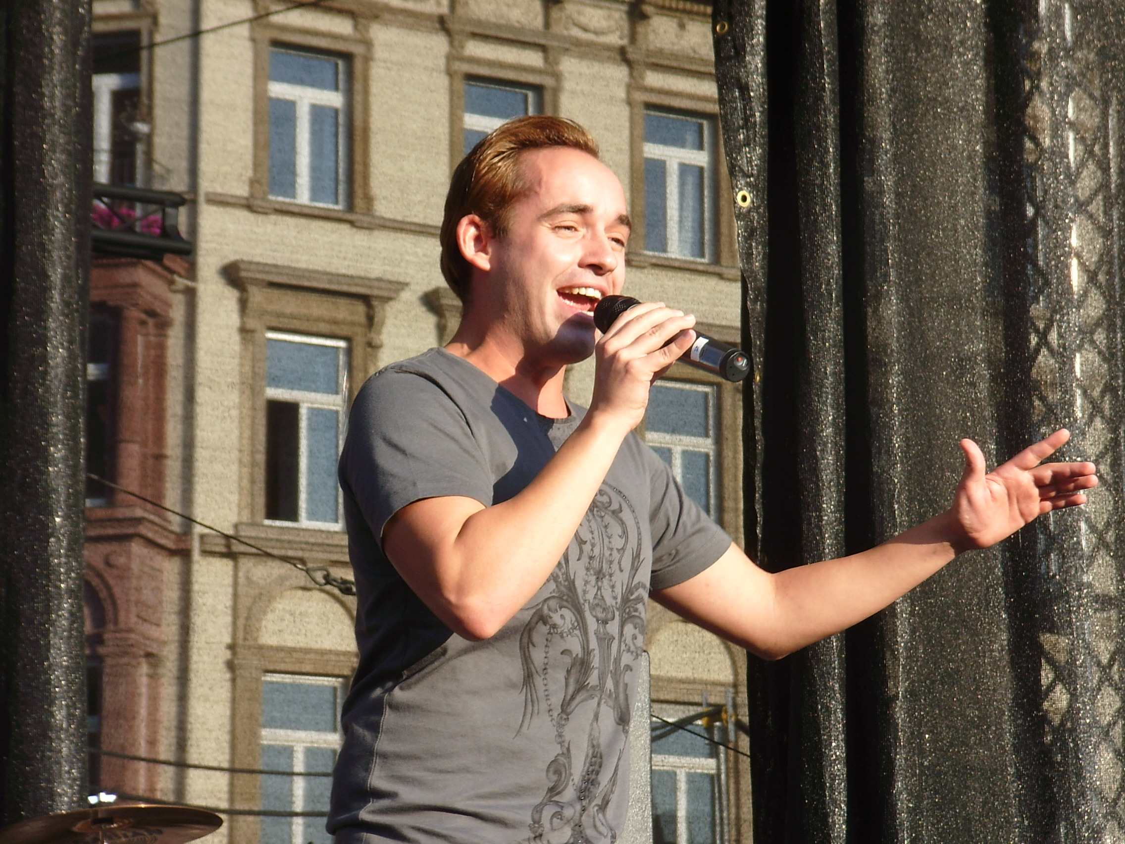 Daniel Küblböck beim Stadtfest in Wiesbaden